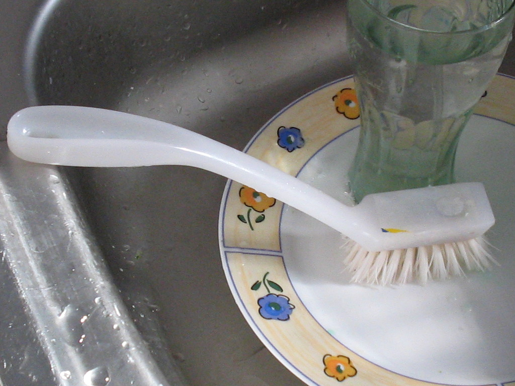 afwasborstel na gebruik